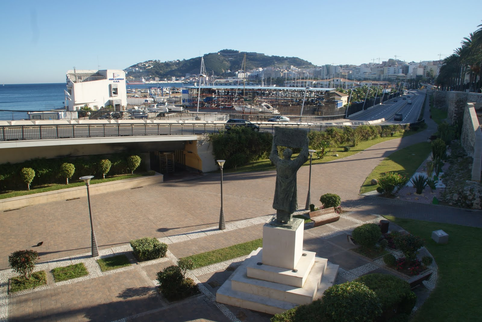 Estatua de Al-Idrisi en Ceuta